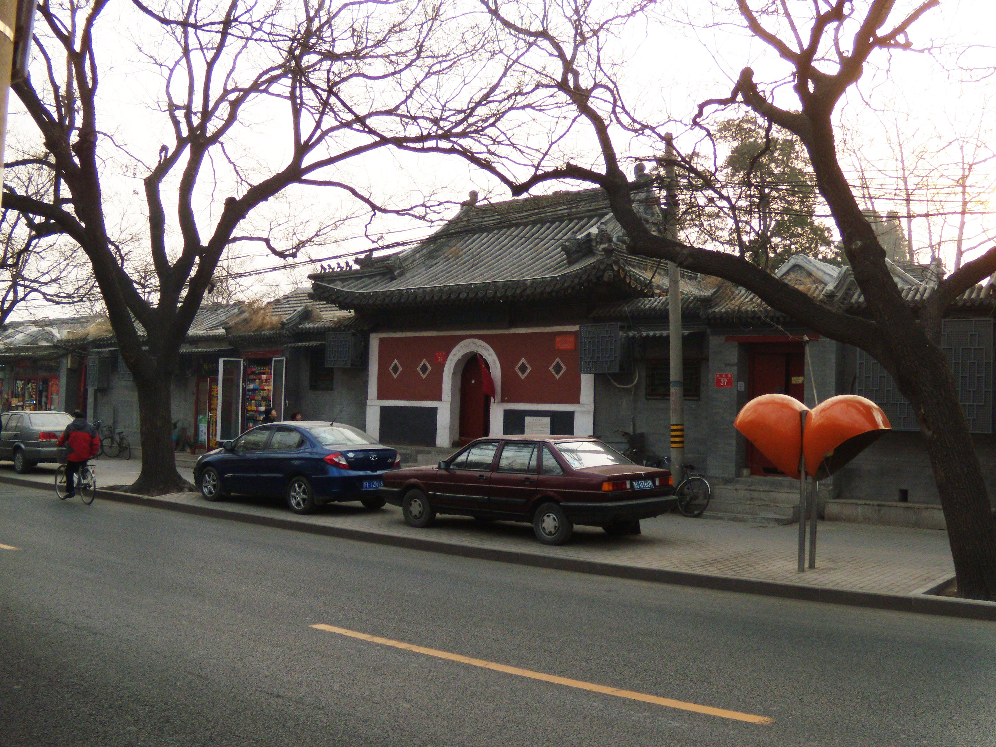 万寿兴隆寺